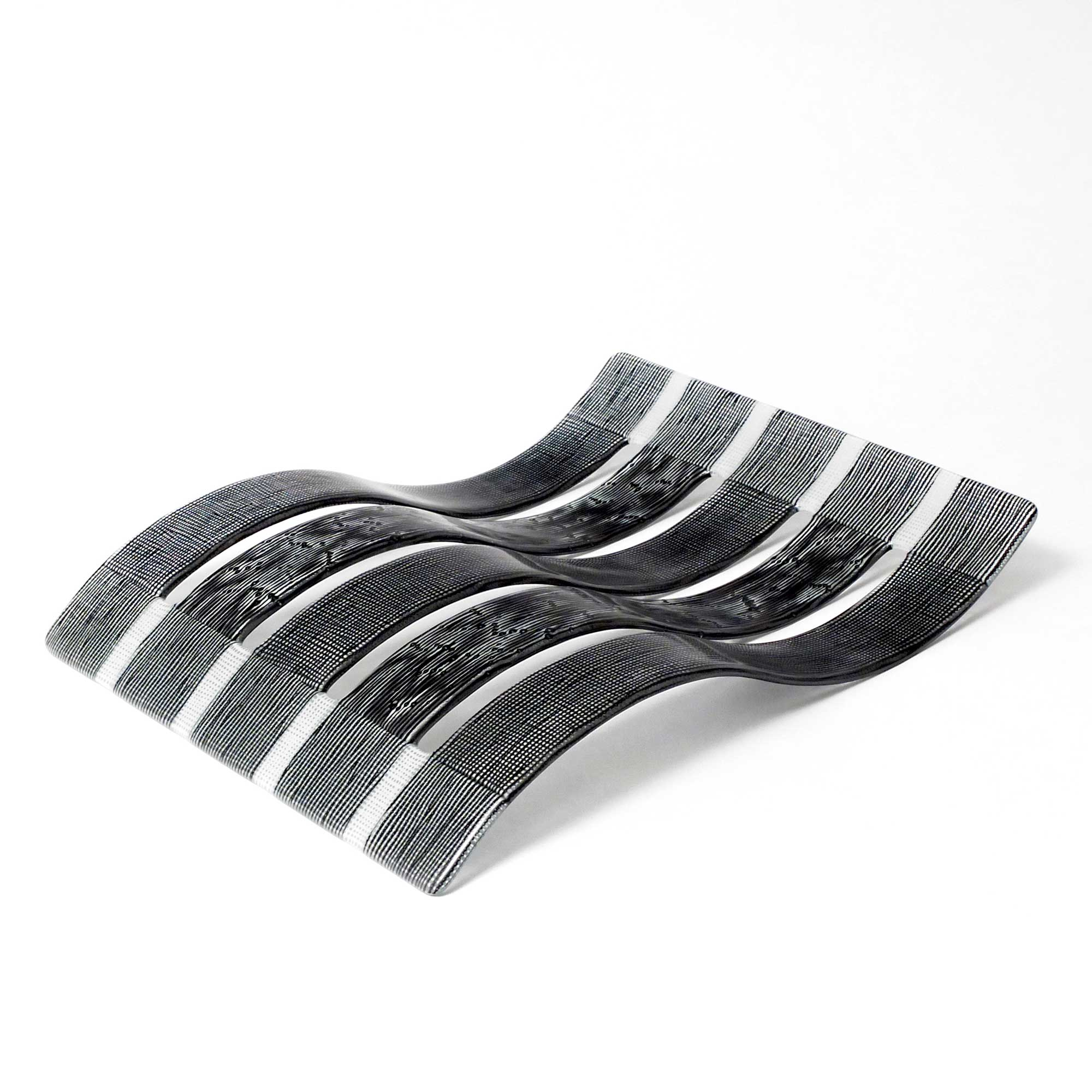 Wellenobjekt, Verschmelztechnik, Jahr 2010, Beschreibung: mit Email eingefärbtes Klarglas, Größe: 46 x 38 x 6cm